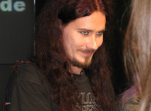 Tuomas, tecladista do Nightwish, em sessão de autógrafos em Hamburgo.